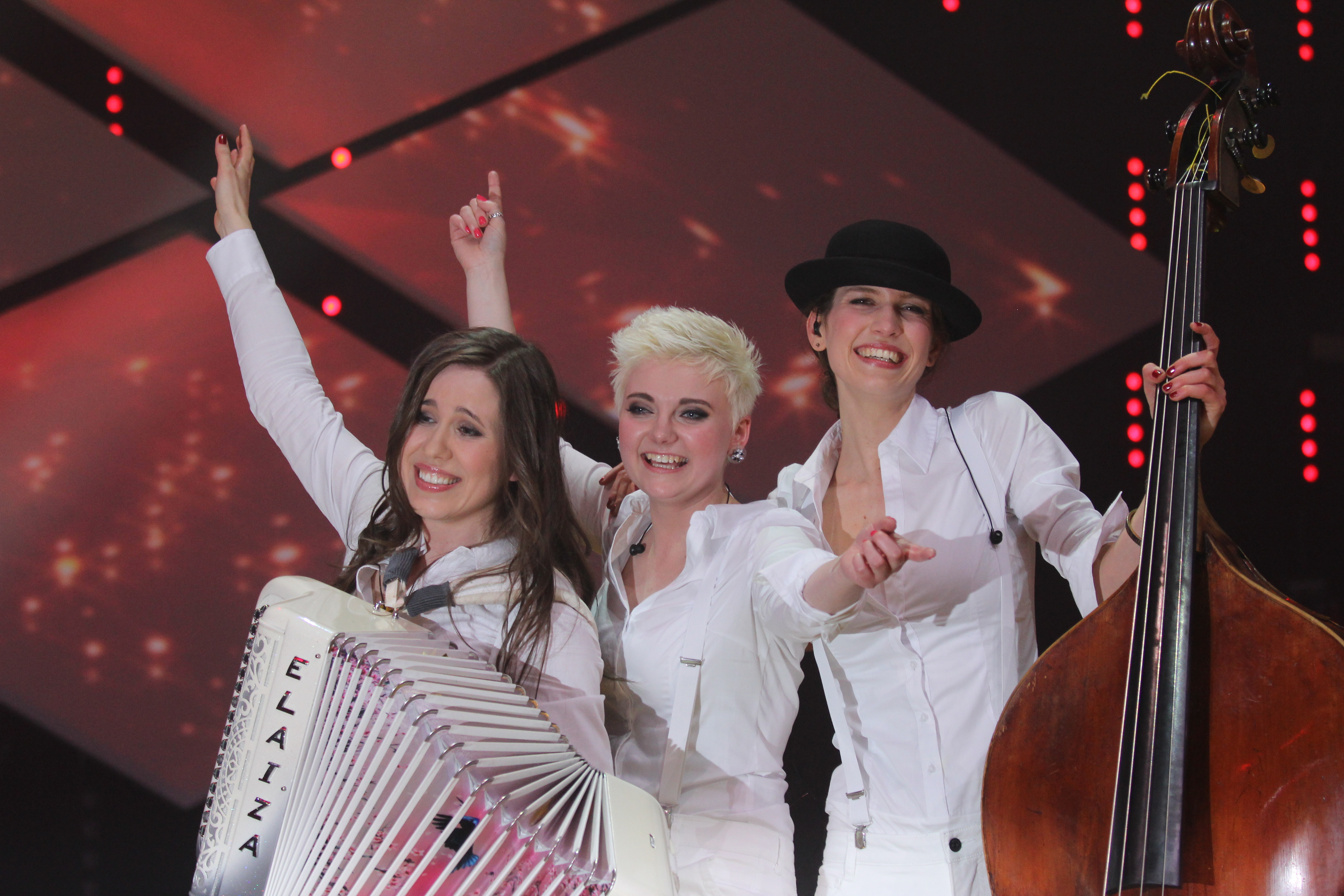 Unser Lied für Dänemark - Elaiza nach ihrem Sieg auf dem Vorentscheid